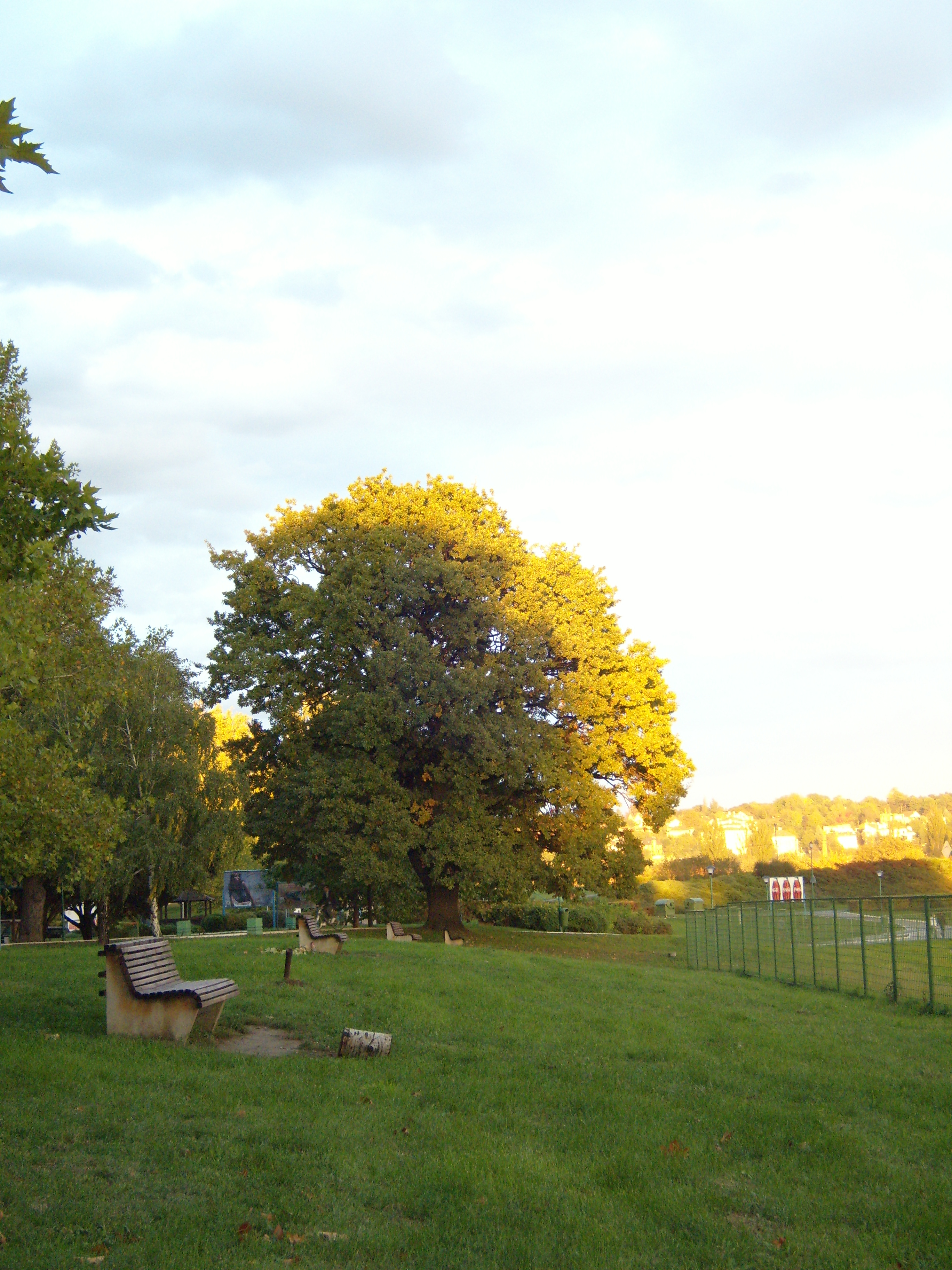 Ada Ciganlija, Belgrade, Serbia